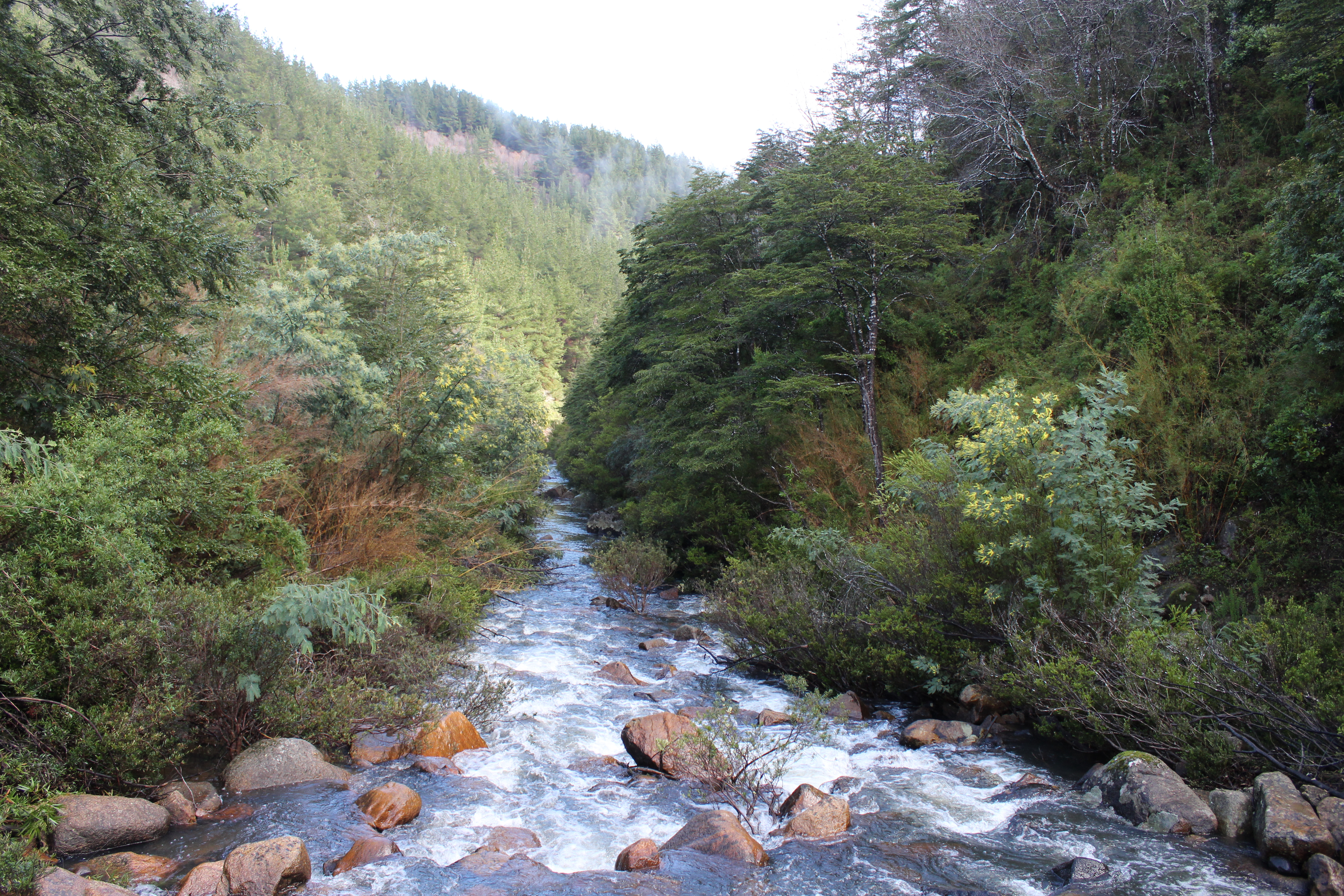 La Reserva Nacional Los Ruiles cuenta con un sendero de excursión de 1,5 kilómetros, en el que se pueden divisar ejemplares de ruiles (nothofagus alessandrii), especie en peligro de extinción, además de otros árboles pertenecientes al bosque nativo de Chile.